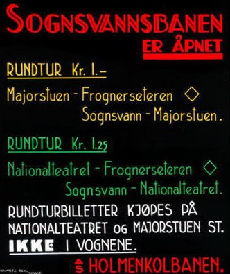 Bildetittel: Sognsvannsbanen er åpnet. Reklameplakat laget av Scwartz rek. Selvig